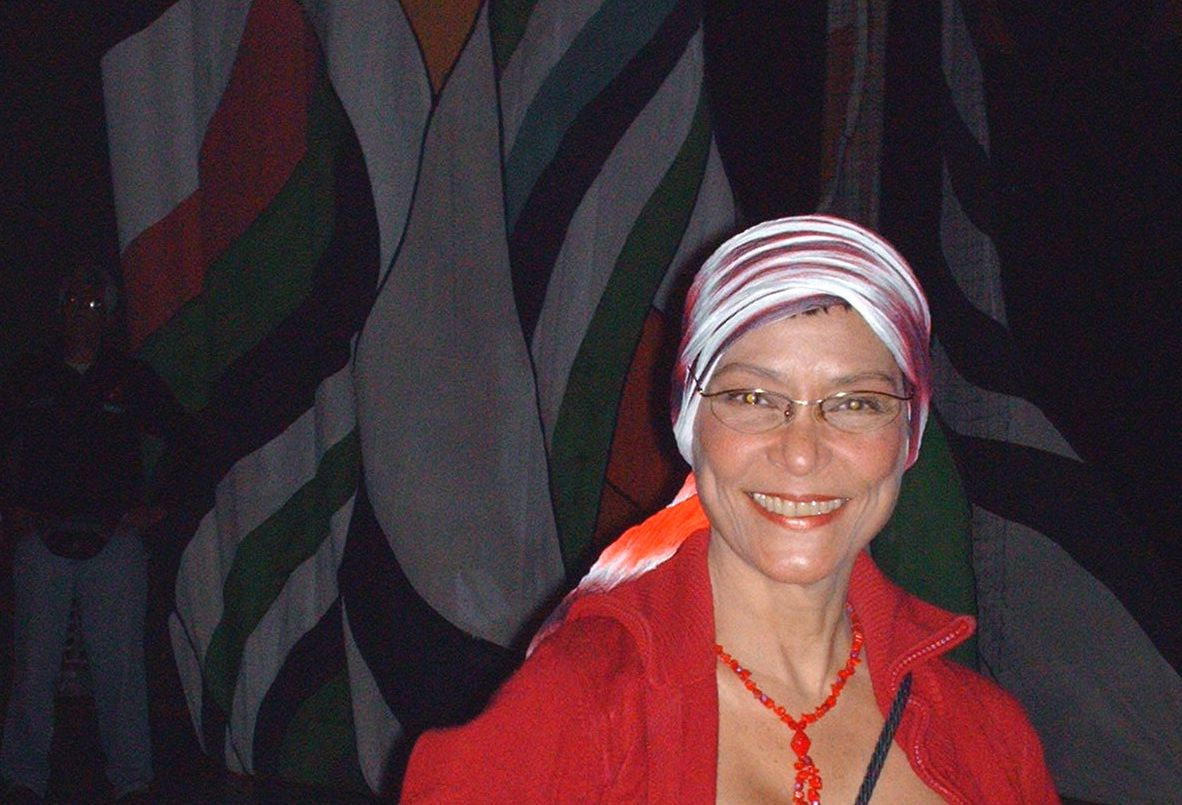 Zhandra Rodríguez, primera bailarina venezolana, durante un ensayo en el Teatro Municipal de Caracas con motivo de los 30 años del Ballet Nuevo Mundo de Caracas